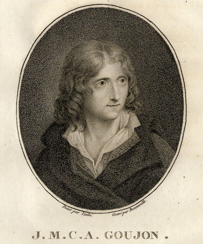 Jean-Marie-Claude-Alexandre Goujon, incisione, 21,7 x 13,8 cm, Château de Versailles et de Trianon